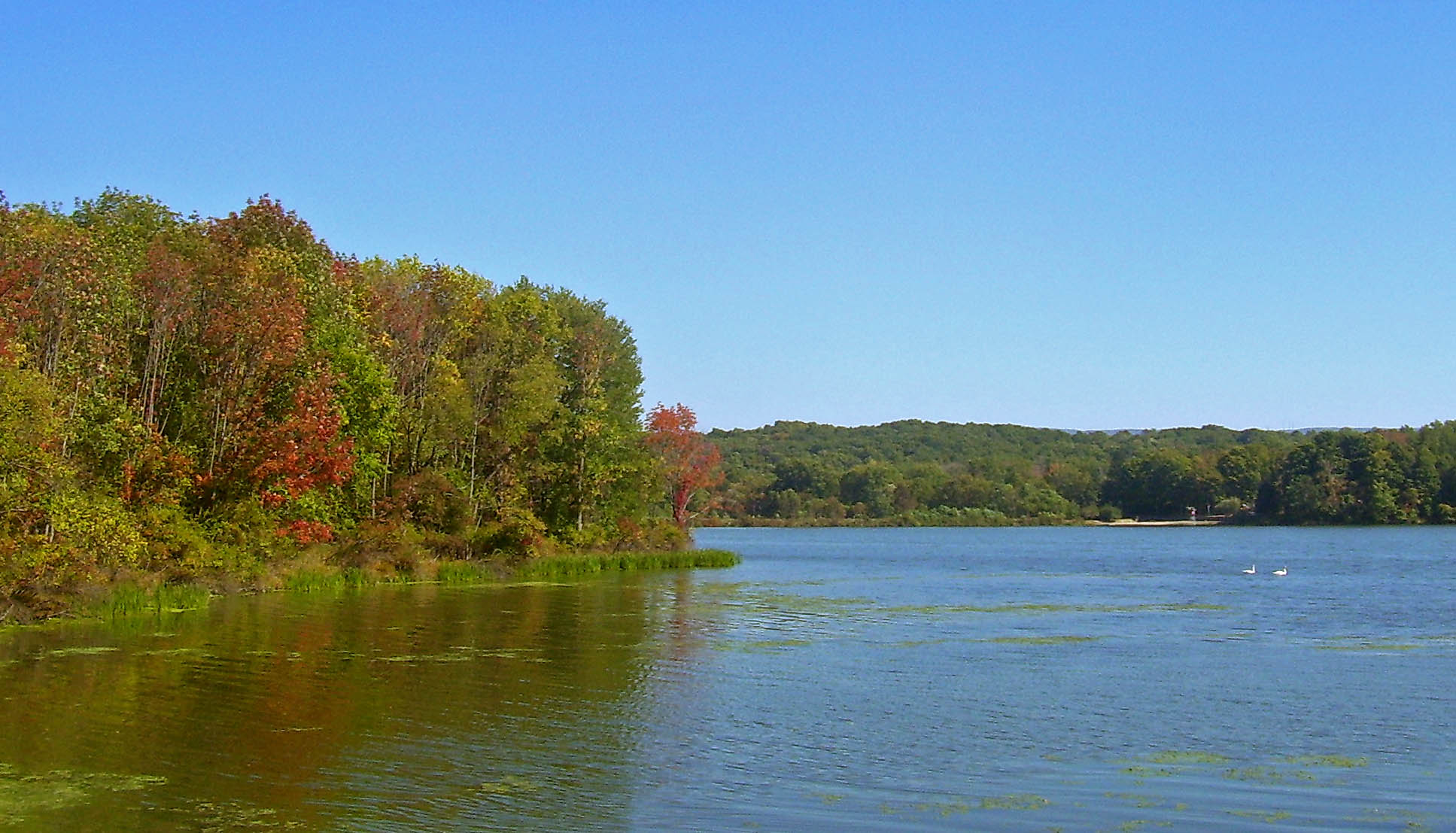 Tomahawk Lake, in Blooming Grove, NY, USA